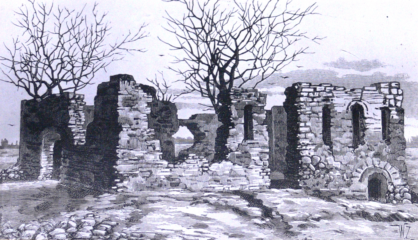 Беларуская (тарашкевіца): Наваградак (Navahradak), дом Адама Міцкевіча (Adam Mickievič)